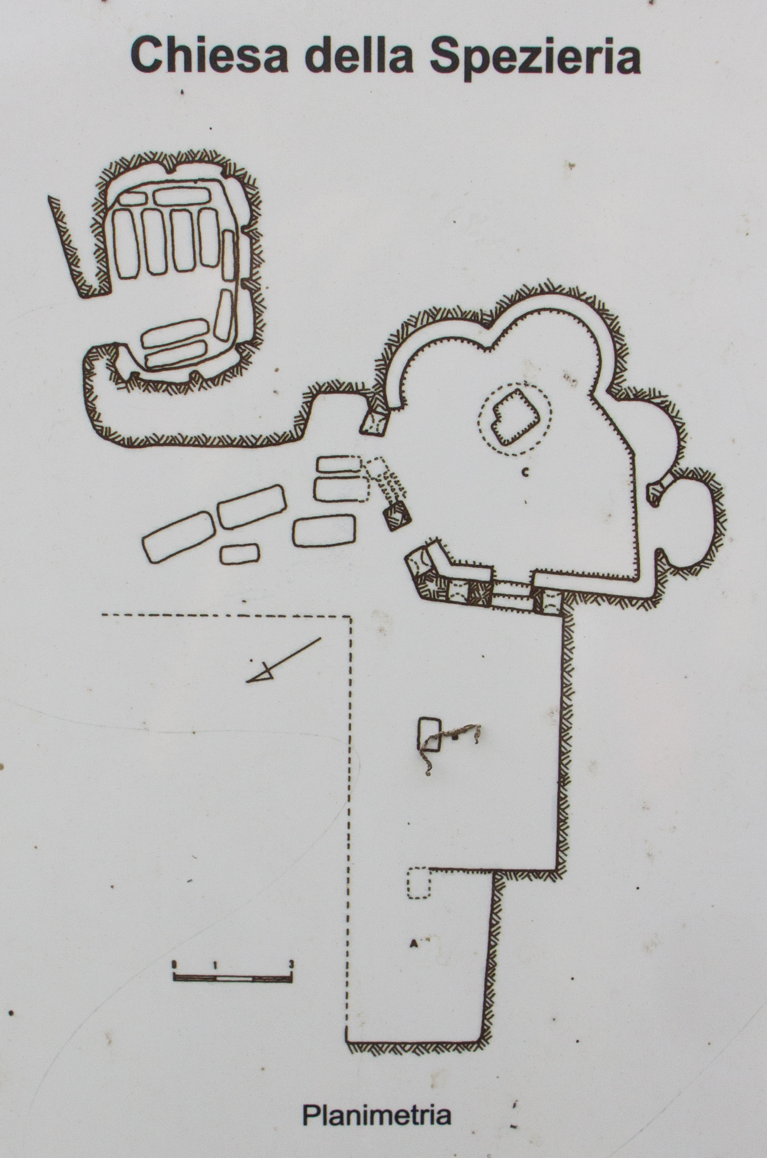 Planimetria della Chiesa della Spezieria